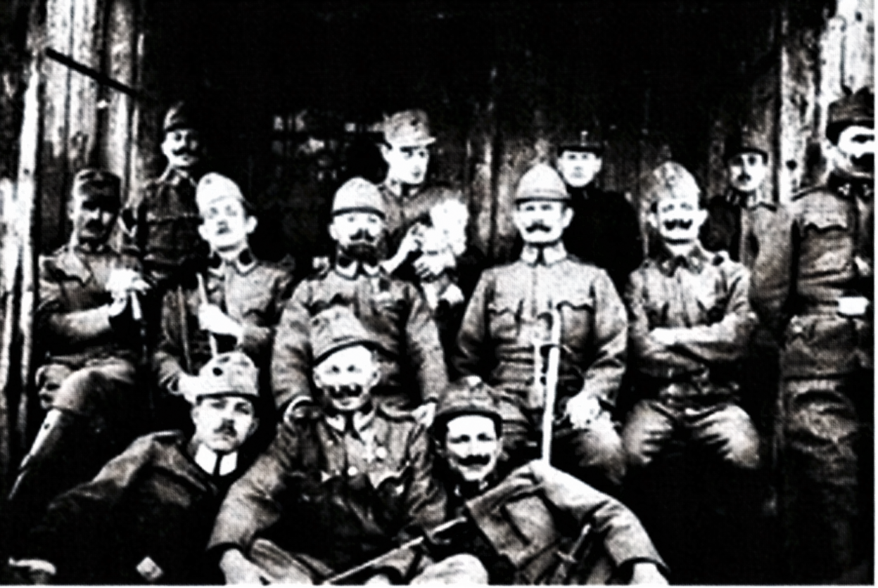 Soldaten des Generals Ioan de Boeriu 1919